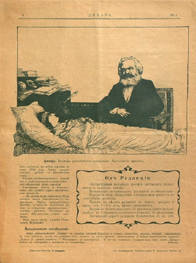 "Il dottor Marx al capezzale della Russia malata: La malattia segue il suo corso, la crisi si avvicina". Dikar', n. 1, marzo 1906, p. 8, San Pietroburgo